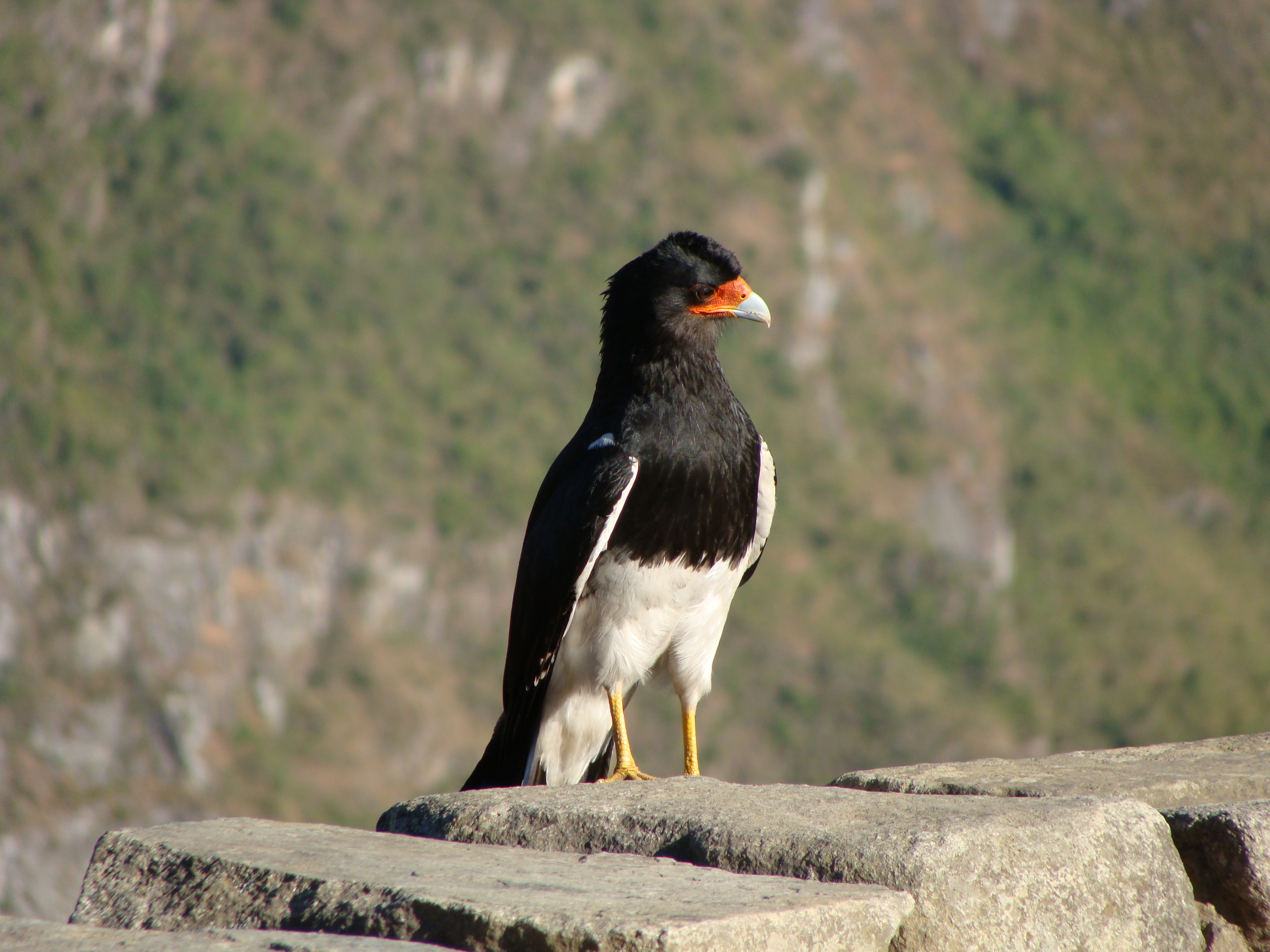 A Mountain Caracara near Machu Picchu, Peru